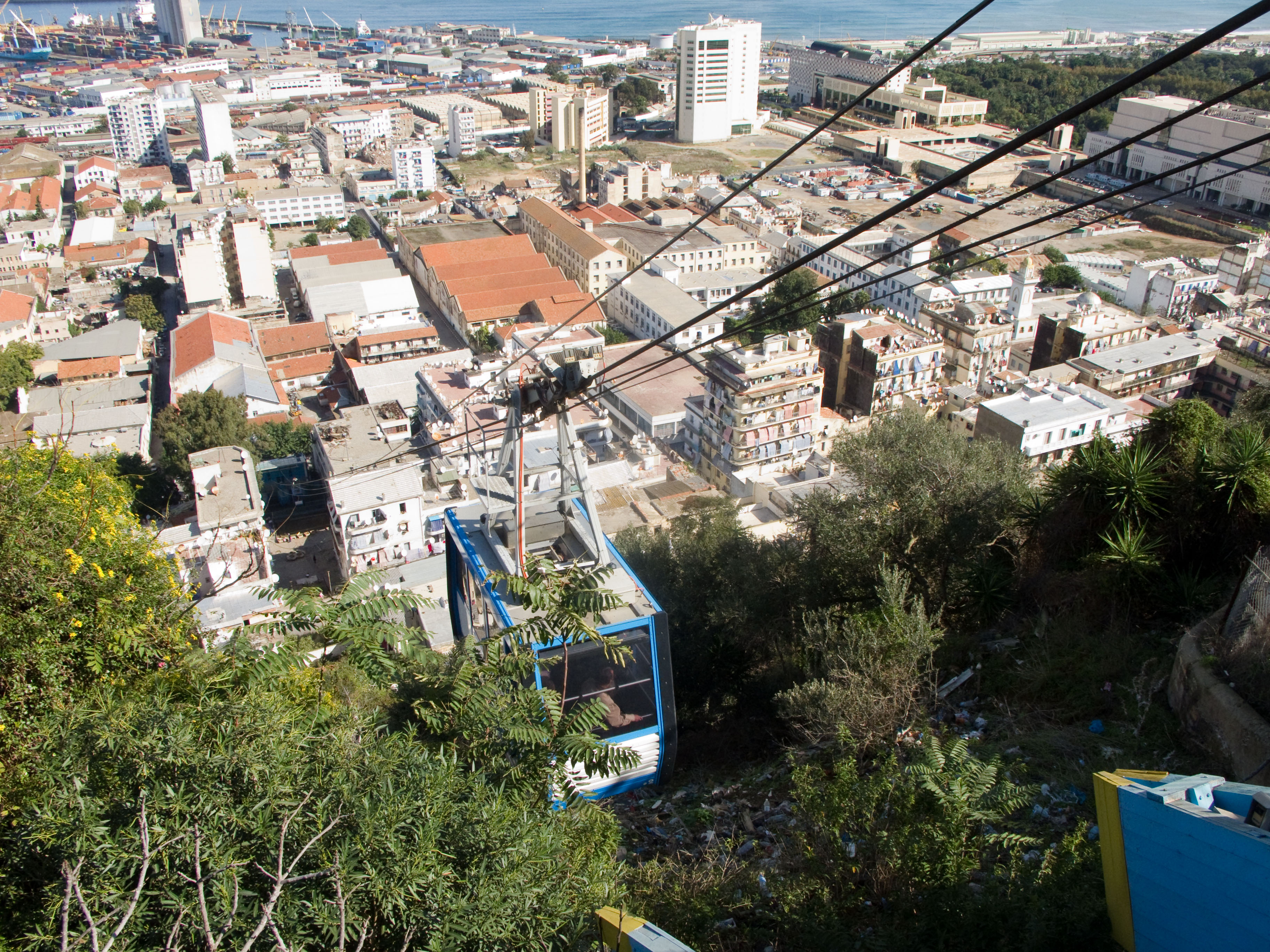 Téléphérique d'El-Madania, Alger, Algérie